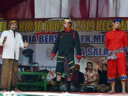 Cin Mleng atau Nok Nik adalah kesenian rakyat yang berasal dari Kelurahan Kauman Kidul, Kecamatan Sidorejo, Kota Salatiga. Kesenian yang berkembang pada zaman Hindia Belanda ini mirip dengan Lenong dari Jakarta, Ludruk dari Surabaya, dan Ketoprak Mataram dari Surakarta dan Yogyakarta. Dialog yang dibawakan dalam kesenian tersebut merupakan cerita umum bertema mengenai kondisi sosial masyarakat. Kesenian ini merupakan salah satu alat perjuangan masyarakat setempat untuk menentang Belanda. Melalui kesenian itu, para pelaku menyampaikan pesan-pesan perjuangan melawan penjajah.